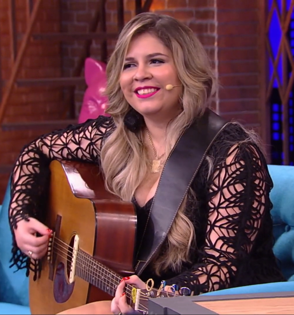 Marília Mendonça participou da segunda temporada do Lady Night! No papo com Tatá Werneck, a sertaneja abriu o coração, falou sobre fama, histórias de família e o mundo da música.